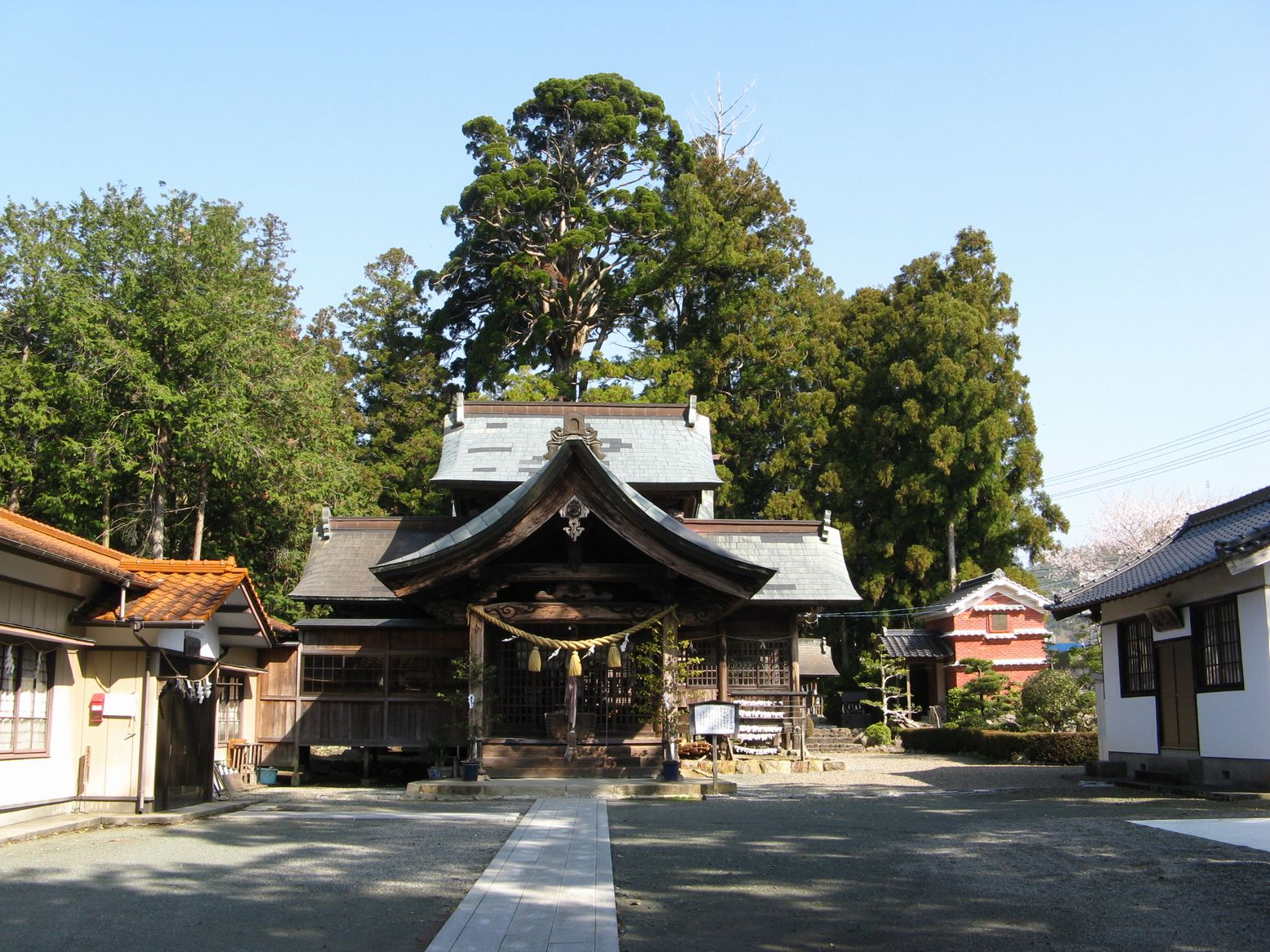 小村神社 拝殿 2008年3月25日 Bakkai撮影